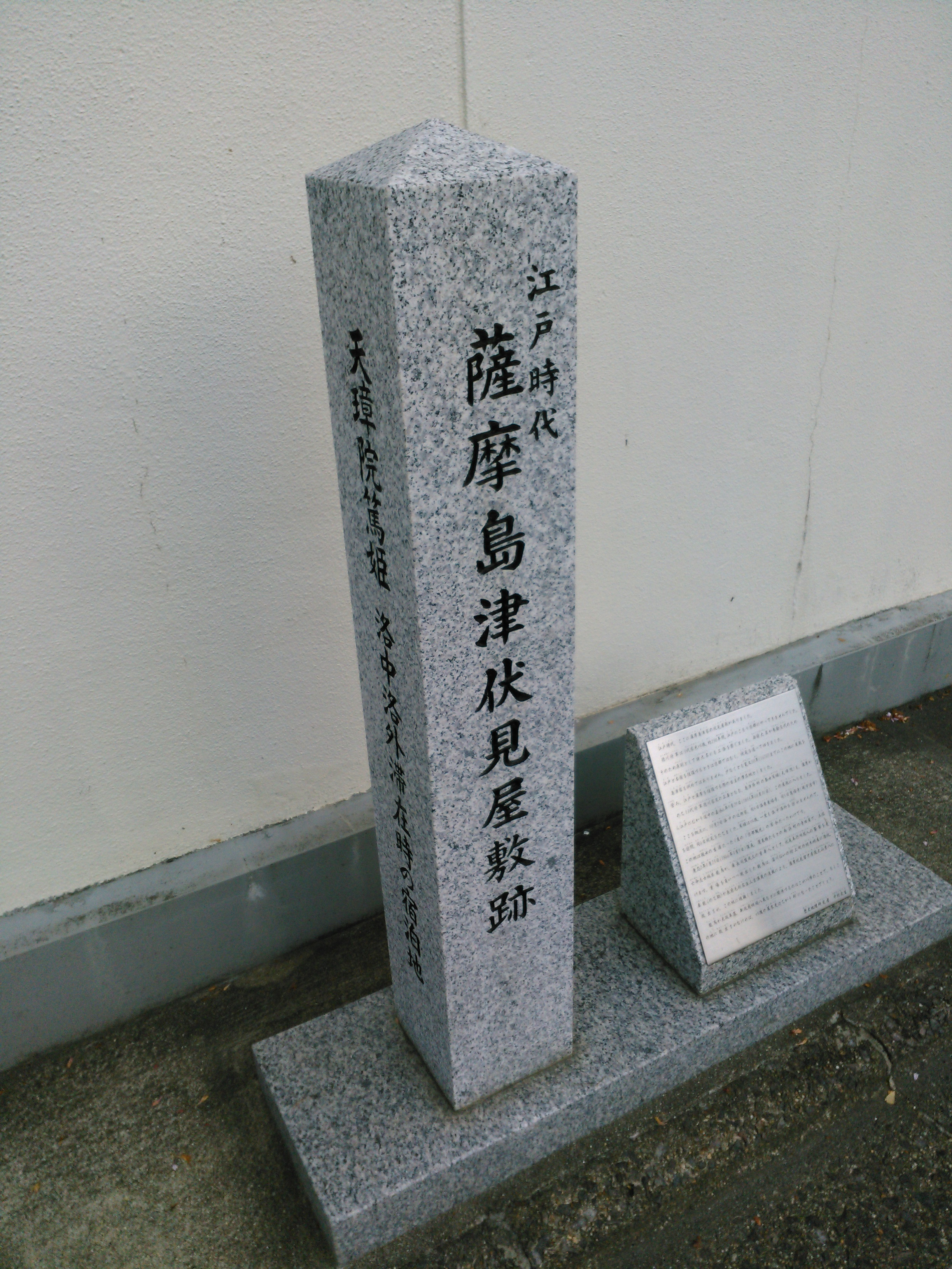 薩摩島津伏見屋敷跡石碑